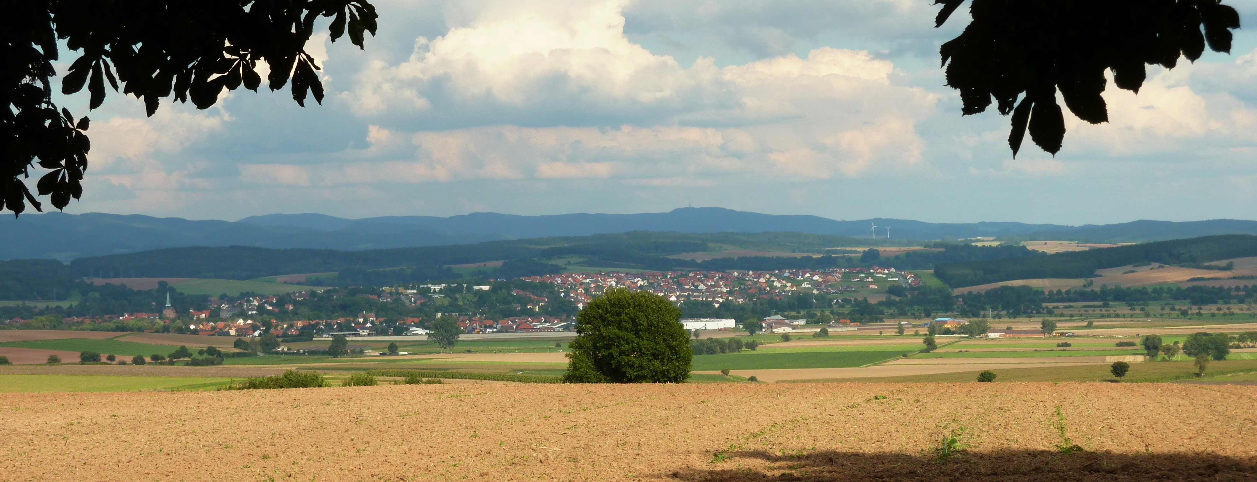 Blick vom Höherberg auf Gieboldehausen mit dem Rotenberg, im Hintergrund der Harz